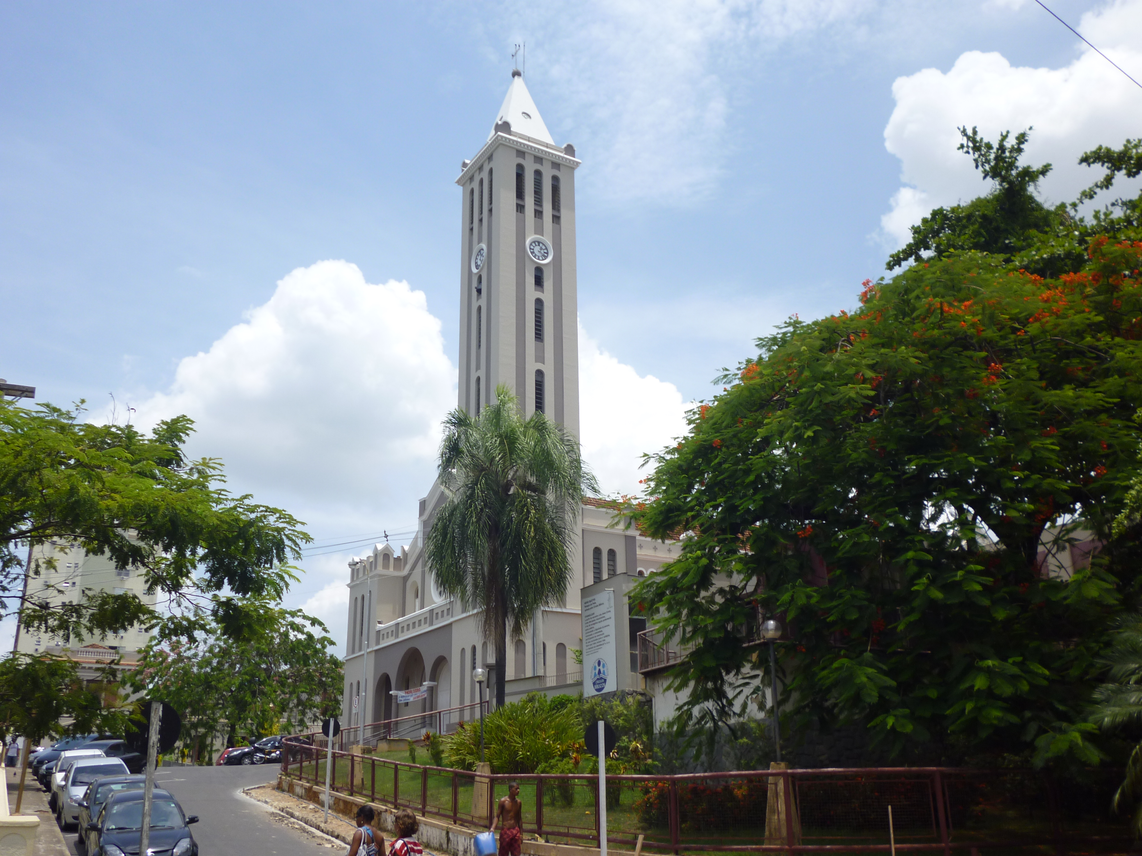 Muriaé MG Brasil - Igreja Matriz de S. Paulo